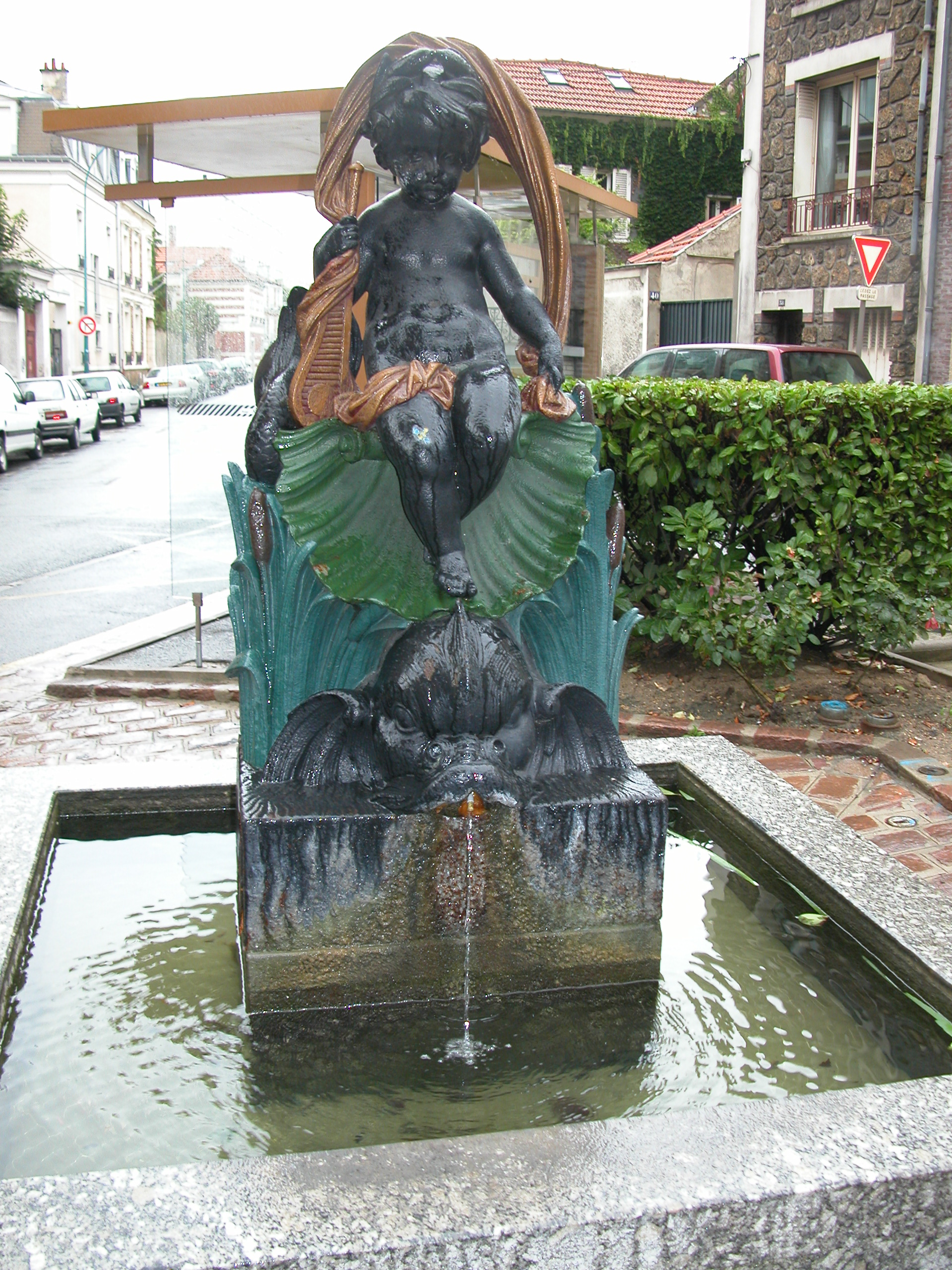 Fontaines des Rosettes, at Fontenay-sous-Bois.